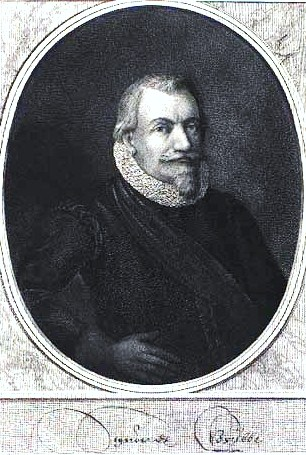 Portrait of Sivert Grubbe(1566-1636)